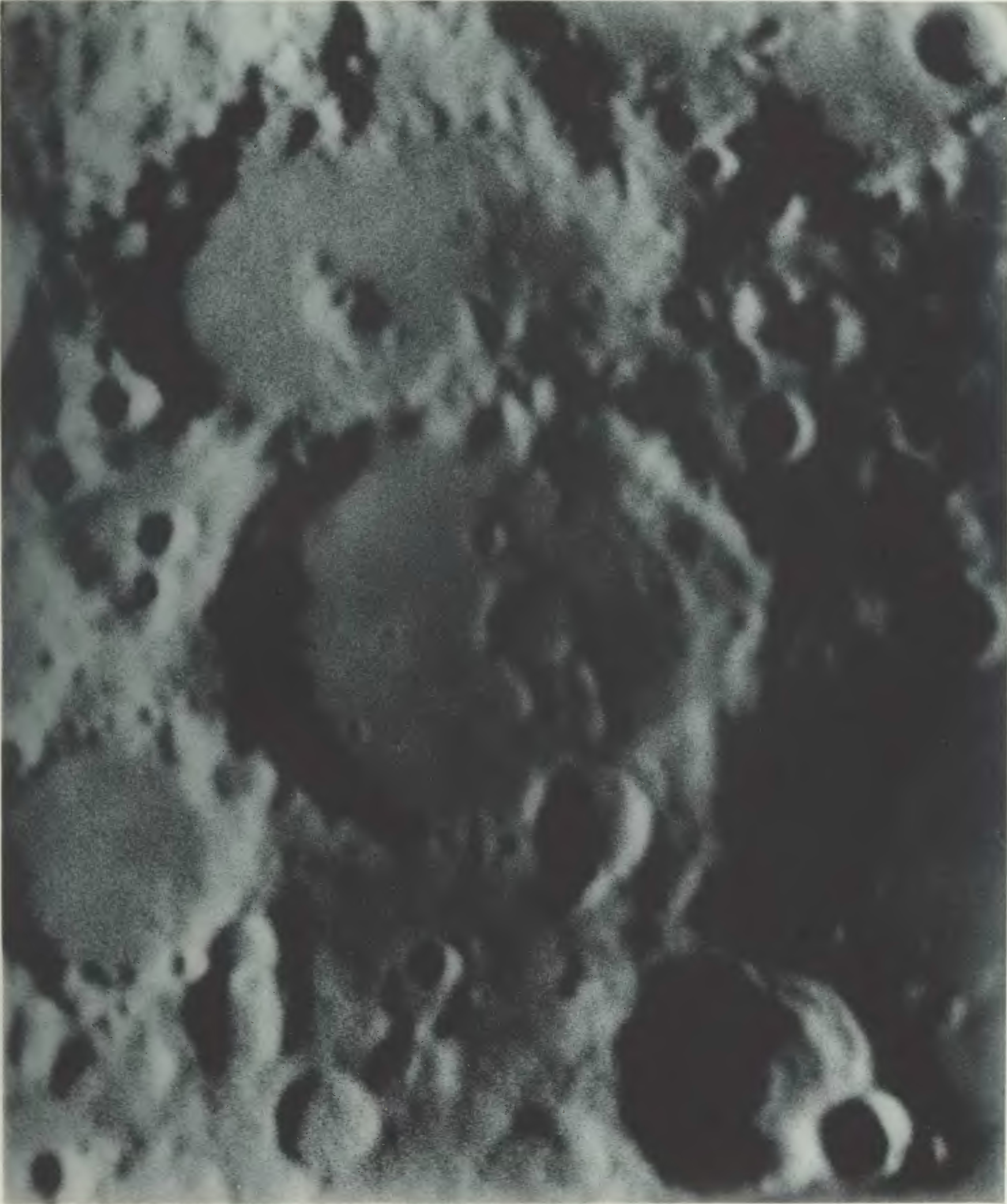 Photographischer Mond-Atlas vornehmlich auf Grund von focalen Negativen der Lick-Sternwarte im Massstabe eines Monddurchmessers von 10 Fuss ausgeführt von Professor Ladislaus Weinek. Heft V. Tafel 95